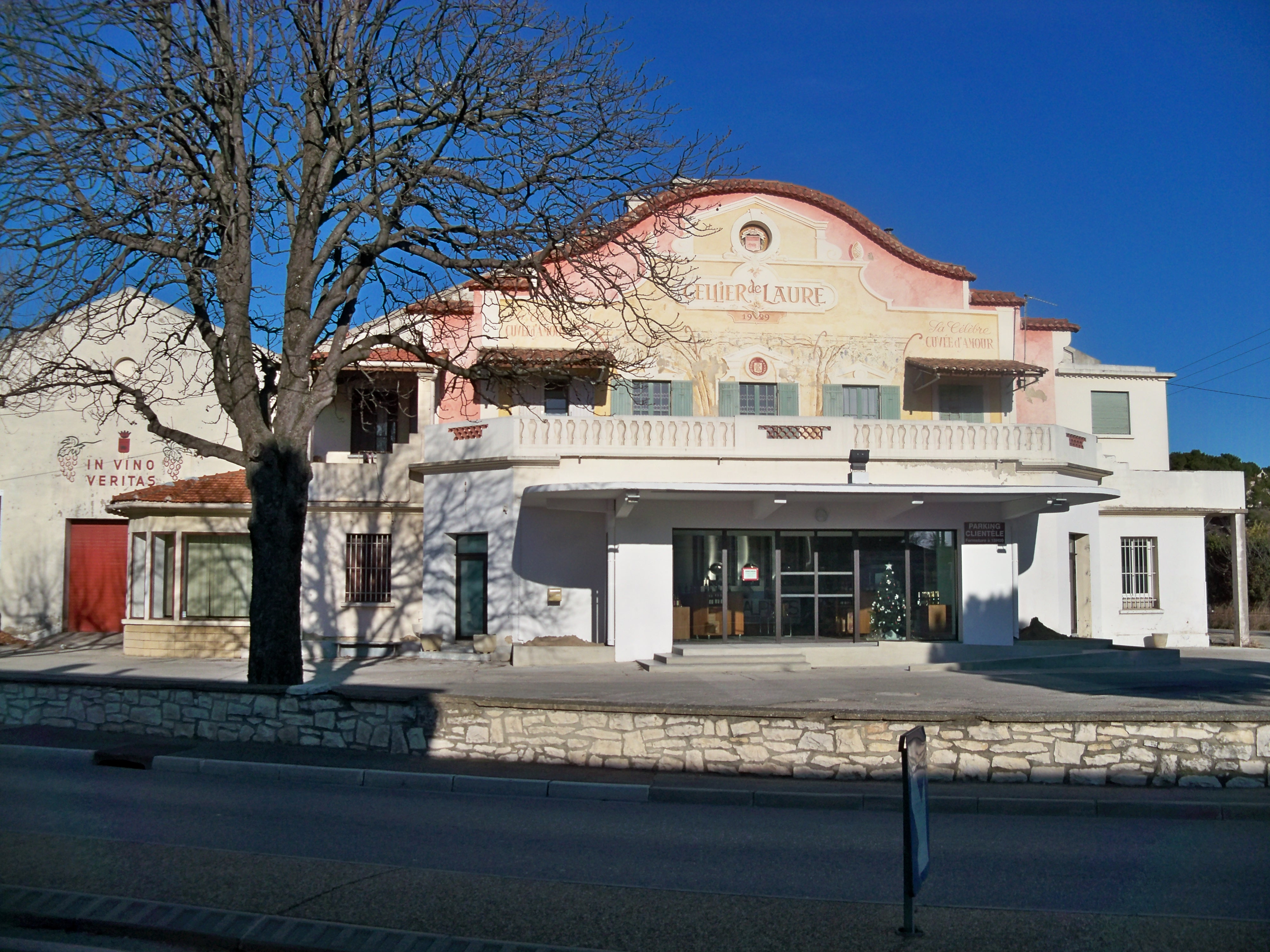 Cave coopérative de Noves (13)